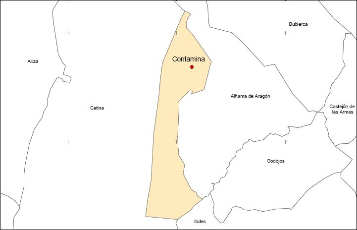 Término de Contamina y alrededores